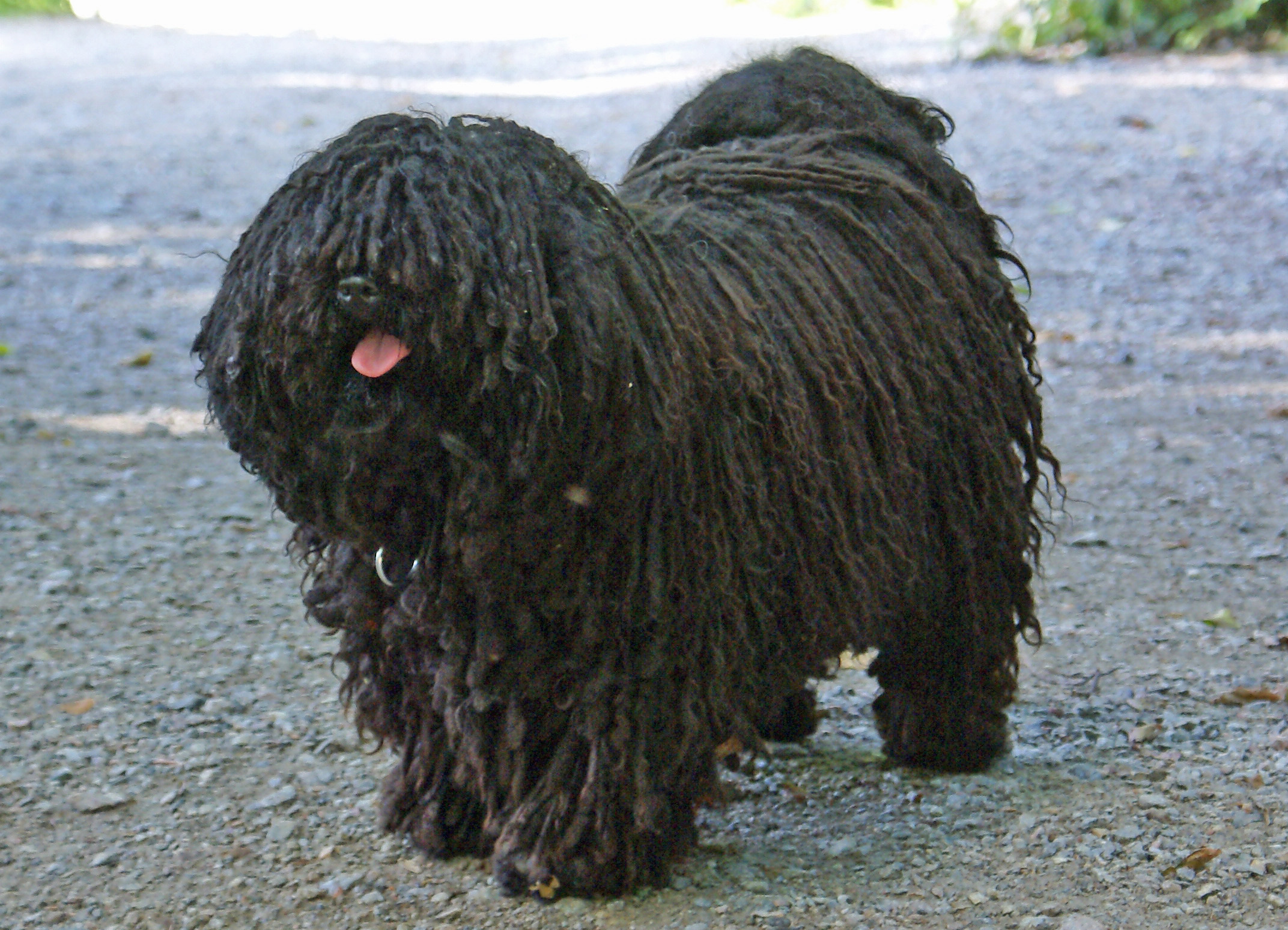 Puli (Ungarischer Hirtenhund), weiblich, 2 1/2 Jahre, hochtypisch